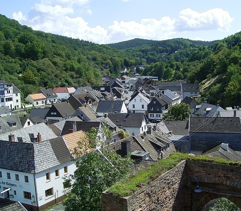 Heimbach